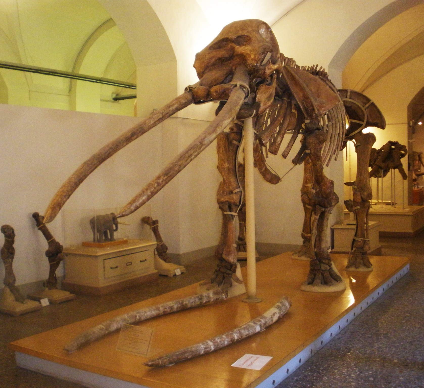 Fossil of Anancus, an extinct mammal - Took the picture at Museo Paleontologico di Firenze